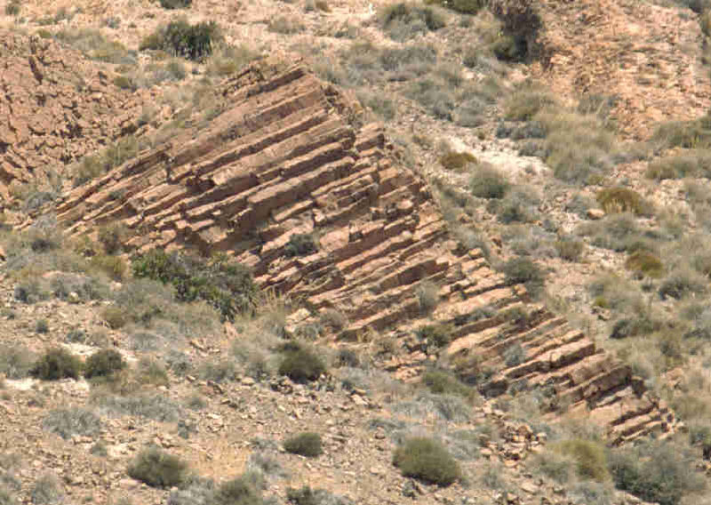 Órganos en el Parque Natural de Cabo de Gata en la provincia de Almería, (España), cerca de San José. Organ formations in the Cabo de Gata Natural Park in Almería province (Spain), near San José.